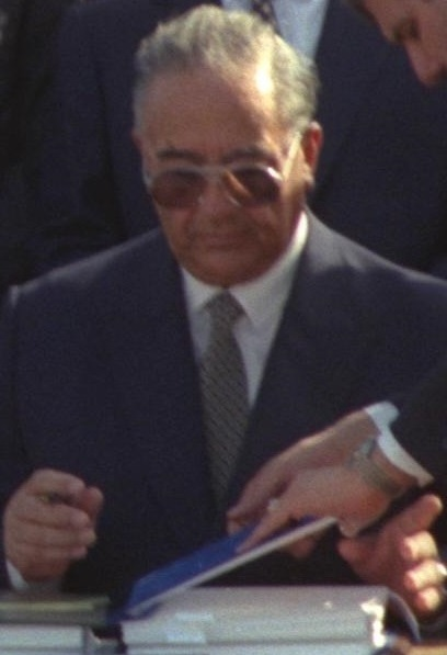 SIGNING THE ISRAEL-JORDAN PEACE TREATY AT THE ARAVA BORDER TERMINAL. SEATED (L-R) P.M. RABIN, U.S. PRES. CLINTON AND JORDANIAN P.M. MAJALI. ראש ממשלת ירדן עבד א-סלאם אל-מג'אלי חותם על הסכם השלום ישראל-ירדן Photo: ISRAELI TSVIKA, 10/26/1994